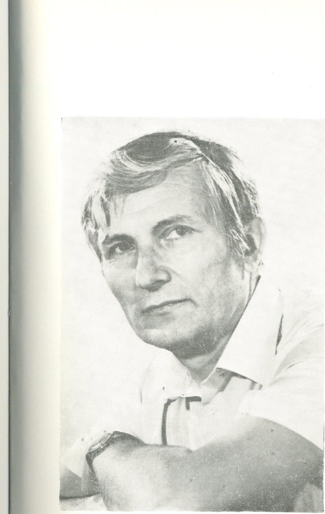 Српски (ћирилица): Лука Хајдуковић